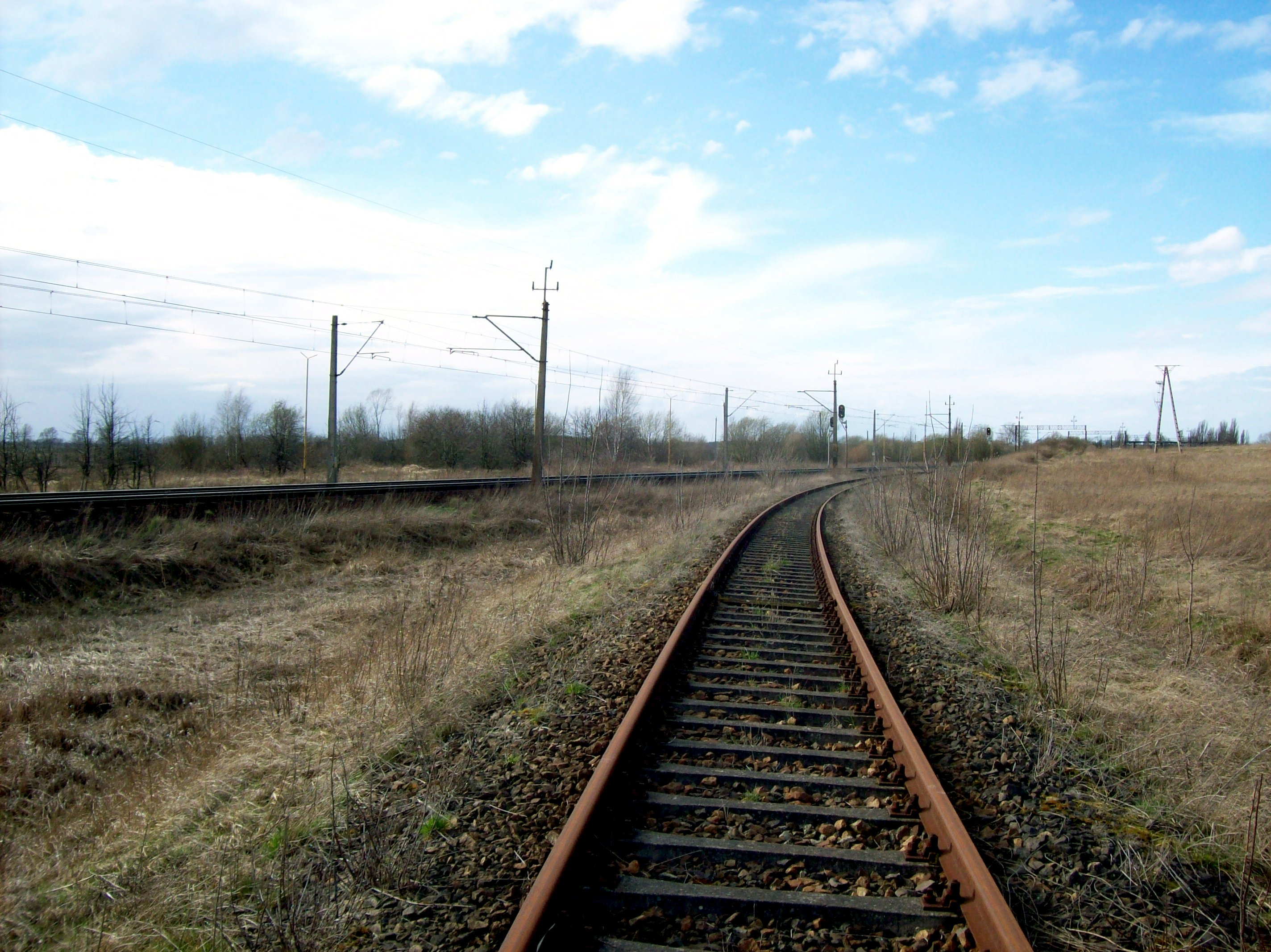 Linia kolejowa 351 oraz 430